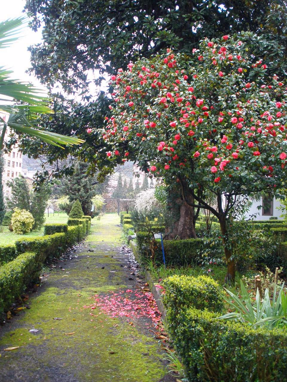 Ciaño (Langreo) - Casa de Cimadevilla-Asilo-Hogar Virgen del Carbayo. Jardines